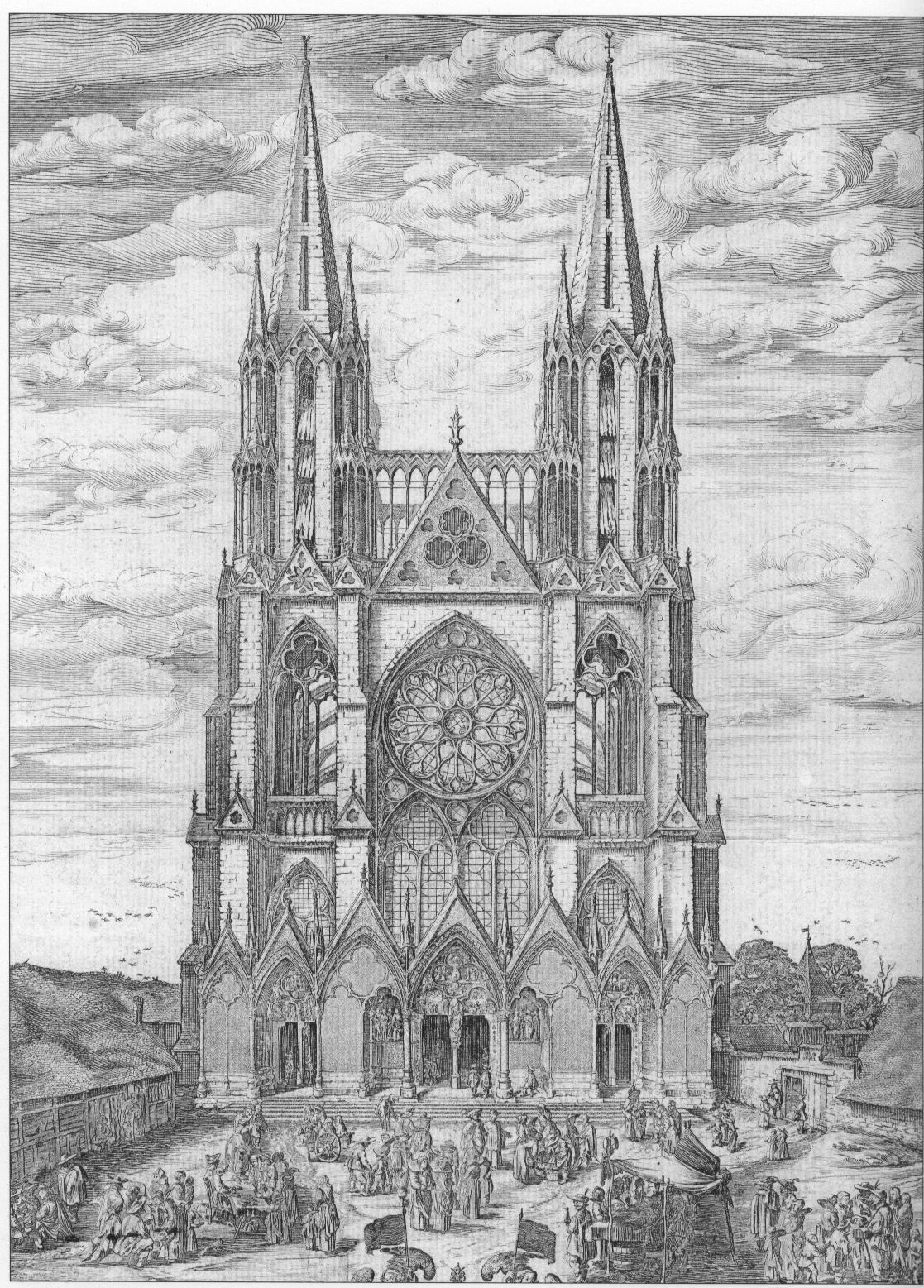 représentation par eau forte de l'église abbatiale saint Nicaise de Reims qui fut vendue comme carrière lors de la Révolution française et détruite .